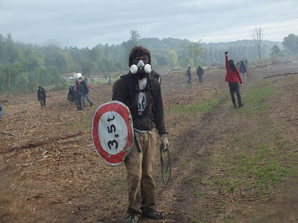 Zadiste, opposant au barrage de Sivens en octobre 2014